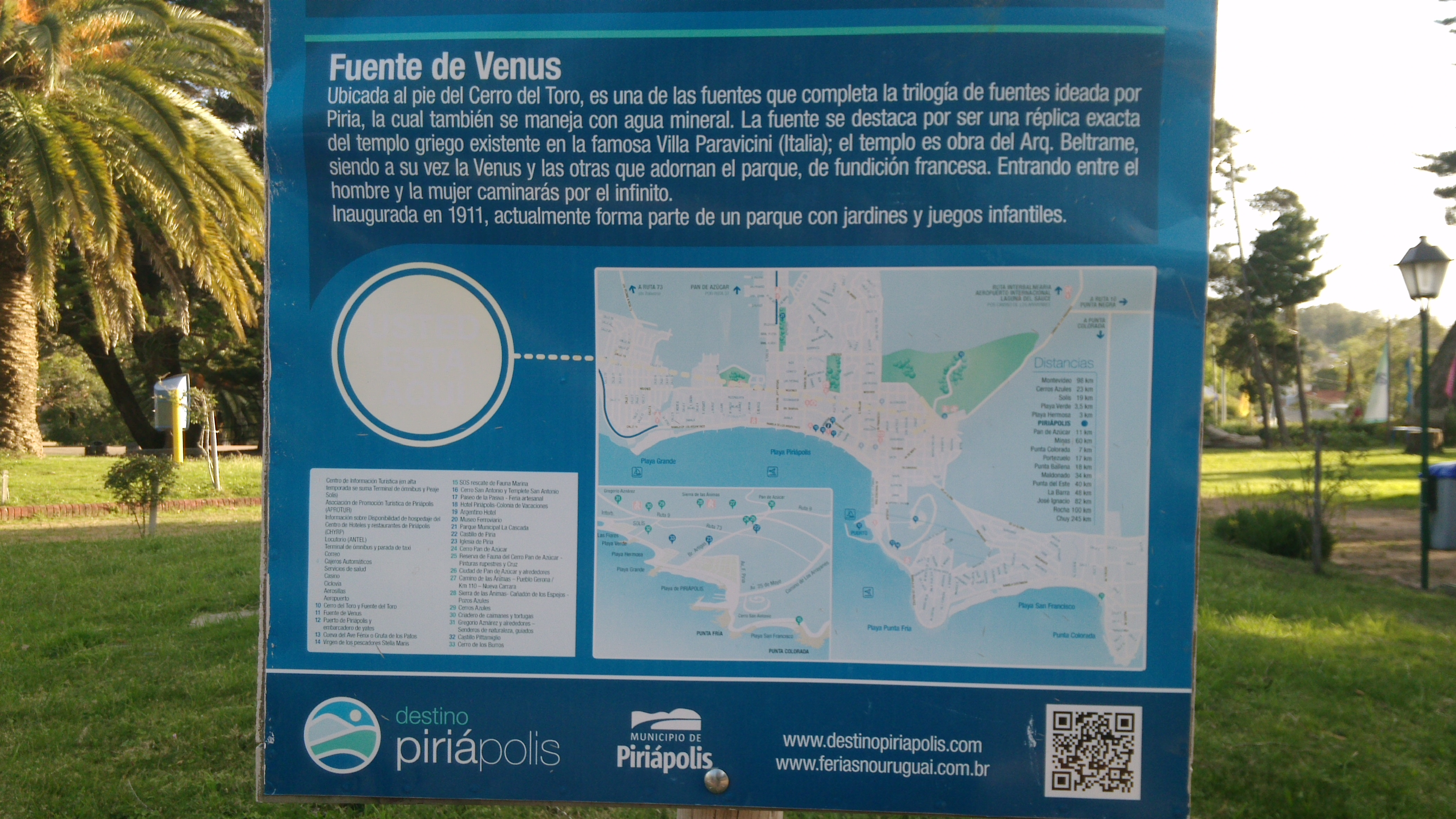 Cartel informativo sobre la Fuente de Venus en Piriápolis, Maldonado, Uruguay